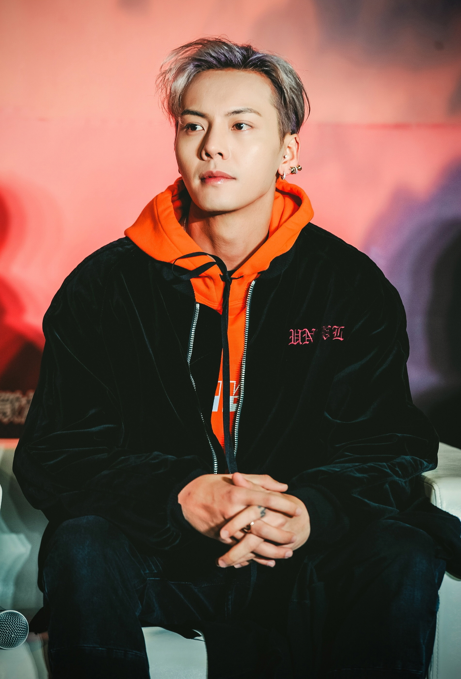 180123上海 热血街舞团HD 2P. 陈伟霆